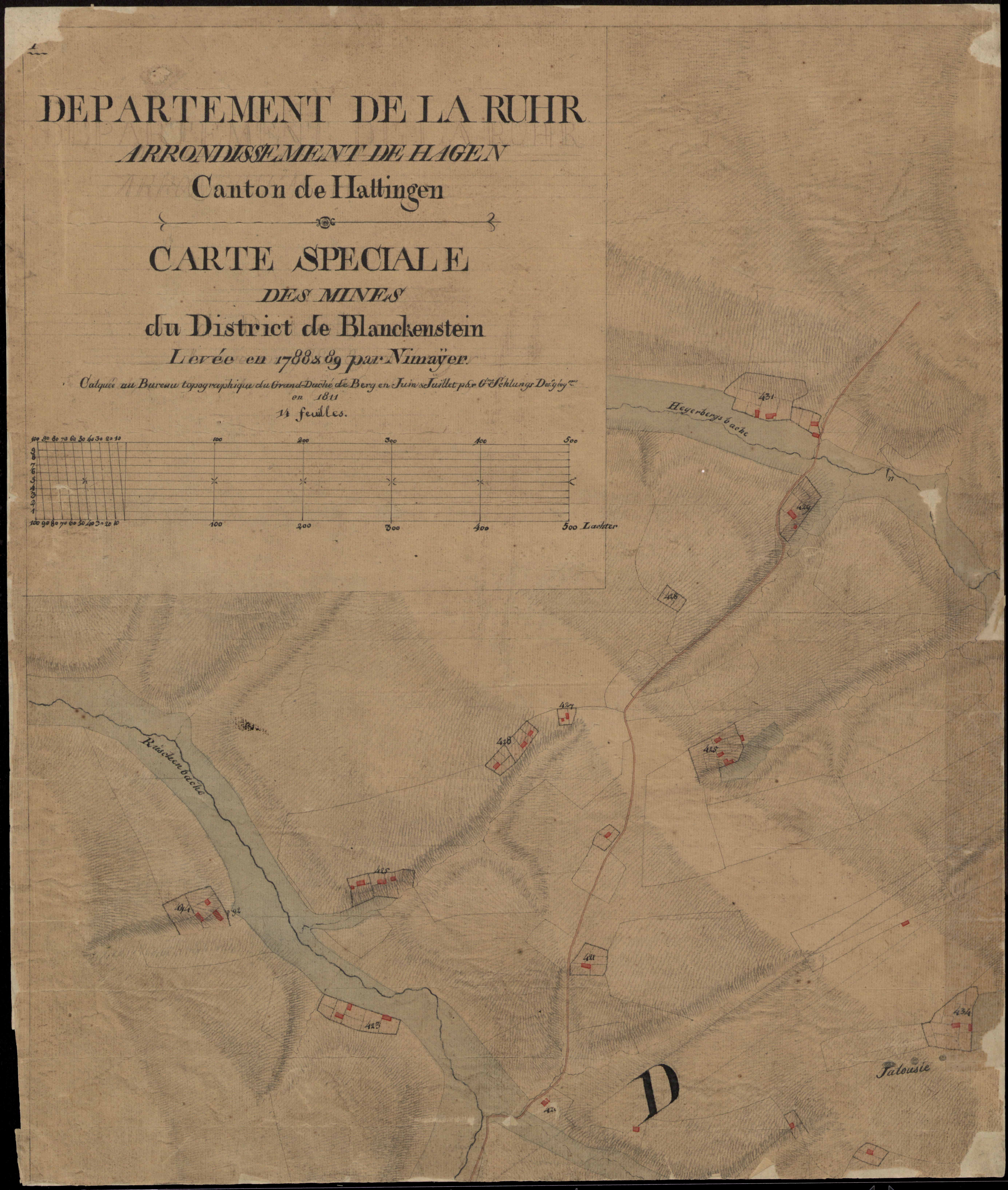 Spezialkarte des Bergwerkdistrikts Blankenstein. Nachdruck als „Carte speciale des mines“. Hattingen.